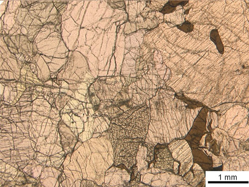 Lherzolite. nicol paralleli